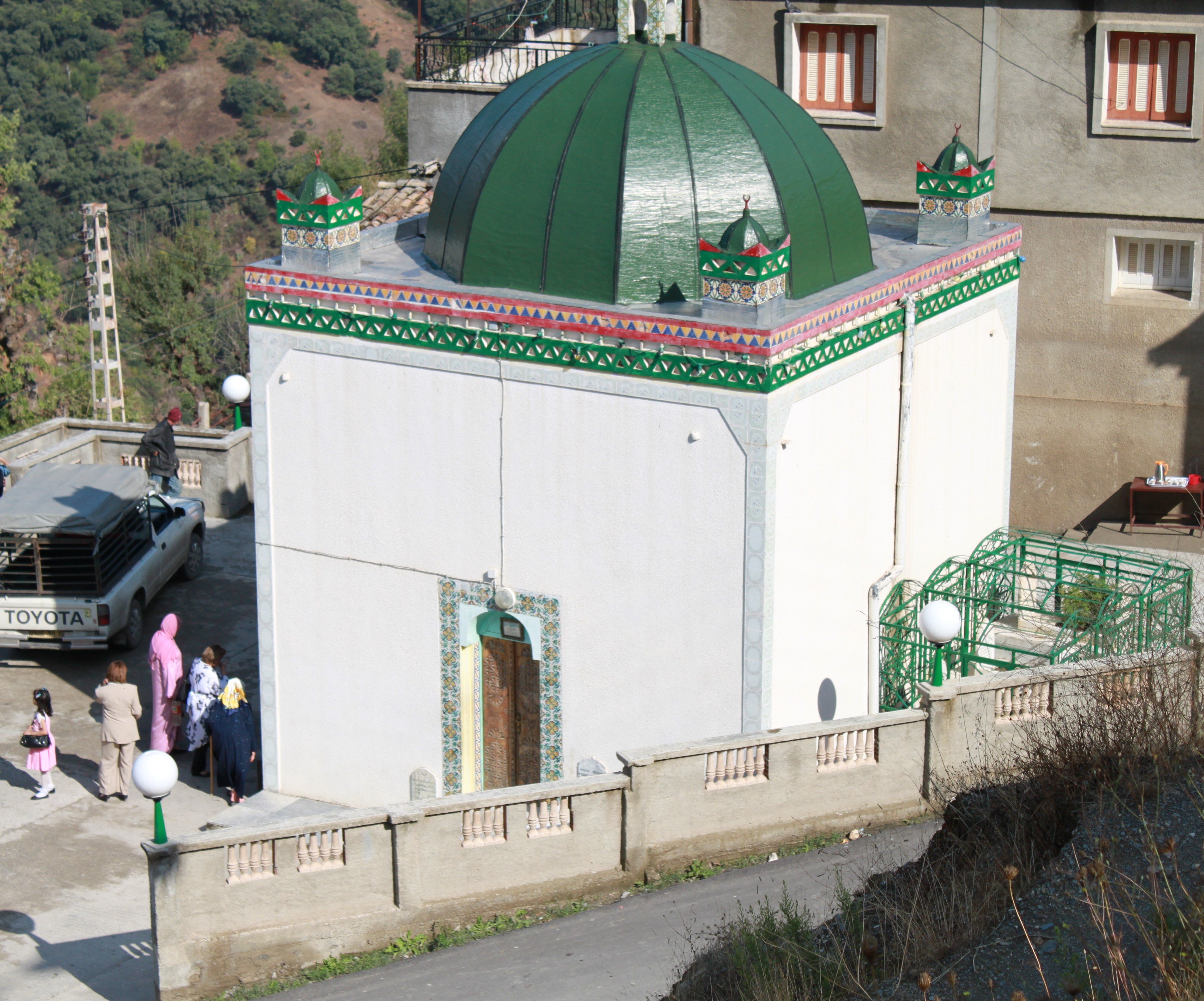 Mausolée du Cheikh Mohand Ou Lhocine, poète kabyle (commune d'Aït Yahia, Algérie).